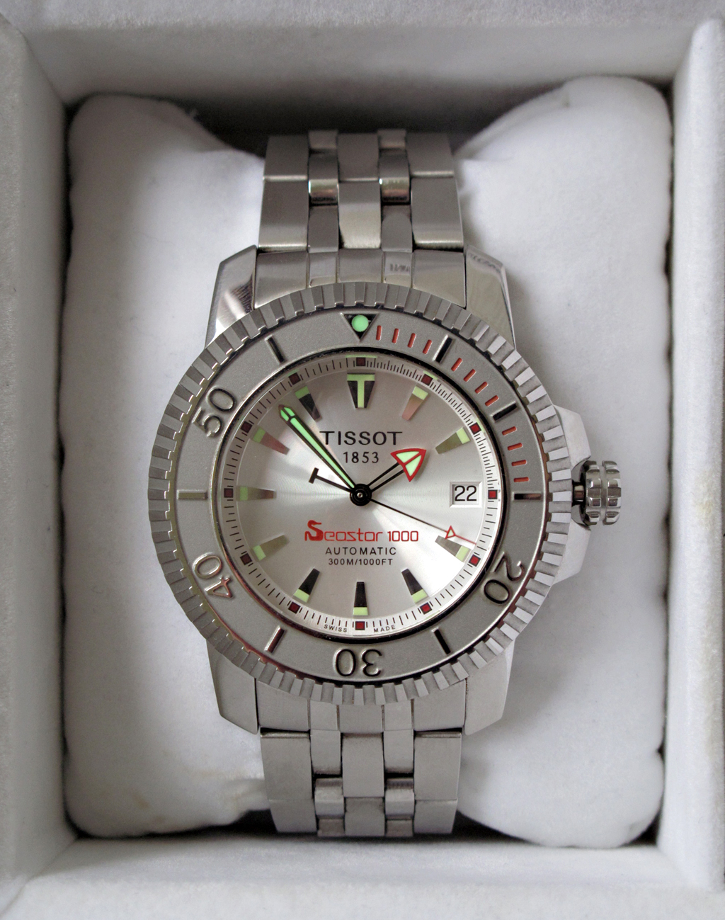 Tissot Seastart 1000 Automatic silver dial ref. no. T19.1.583.31